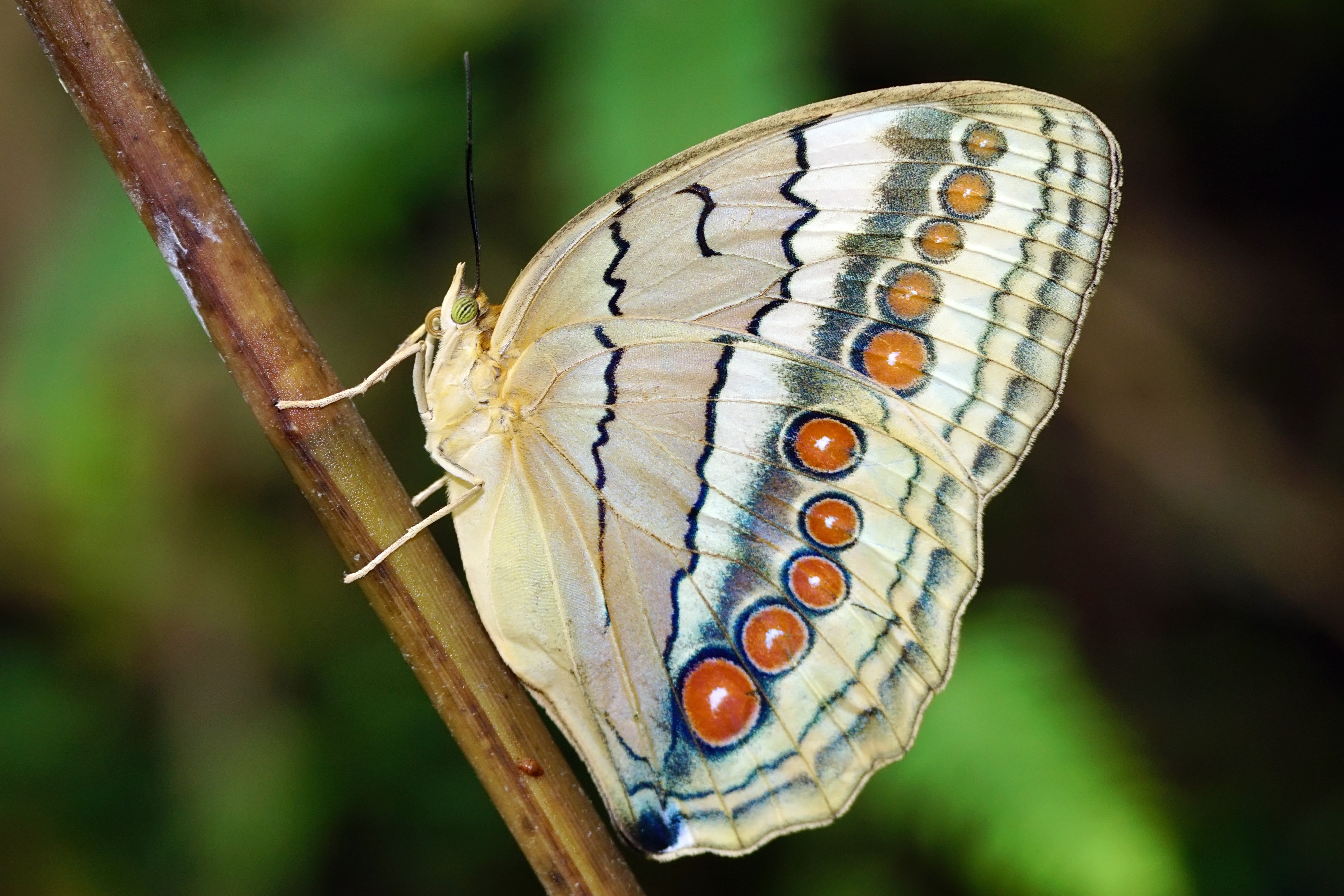 箭環蝶 Stichophthalma howqua formosana 雌